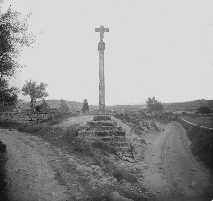 Creu de l ' Hostal de la Banya. Josep Salvany i Blanch (1923)